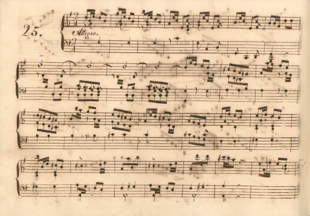 La sonate K. 412, telle qu'elle se présente dans le manuscrit de Parme, volume XI no. 25.